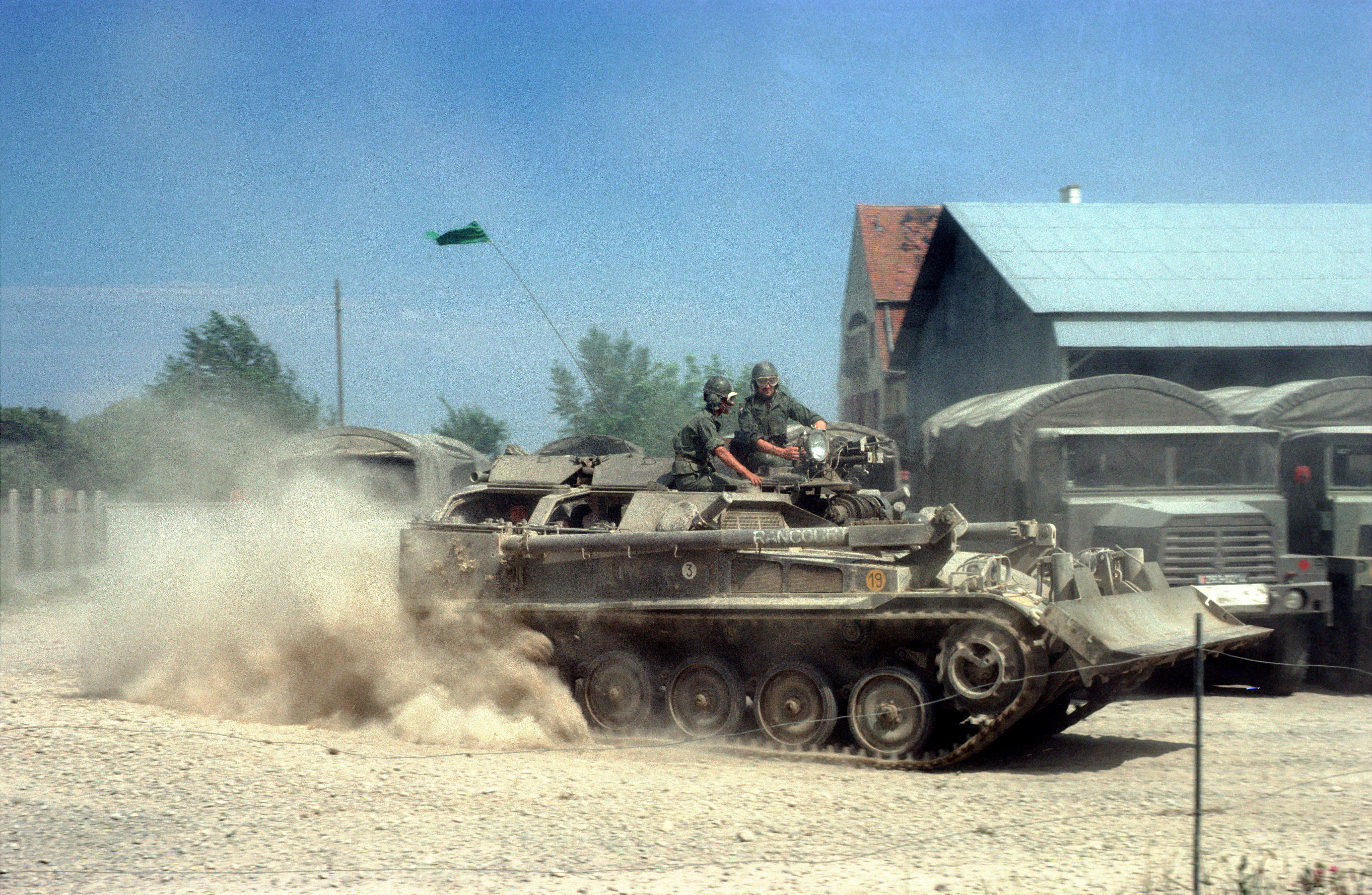 Portes Ouvertes à la caserne Abbatucci. VCG de la 9/5.